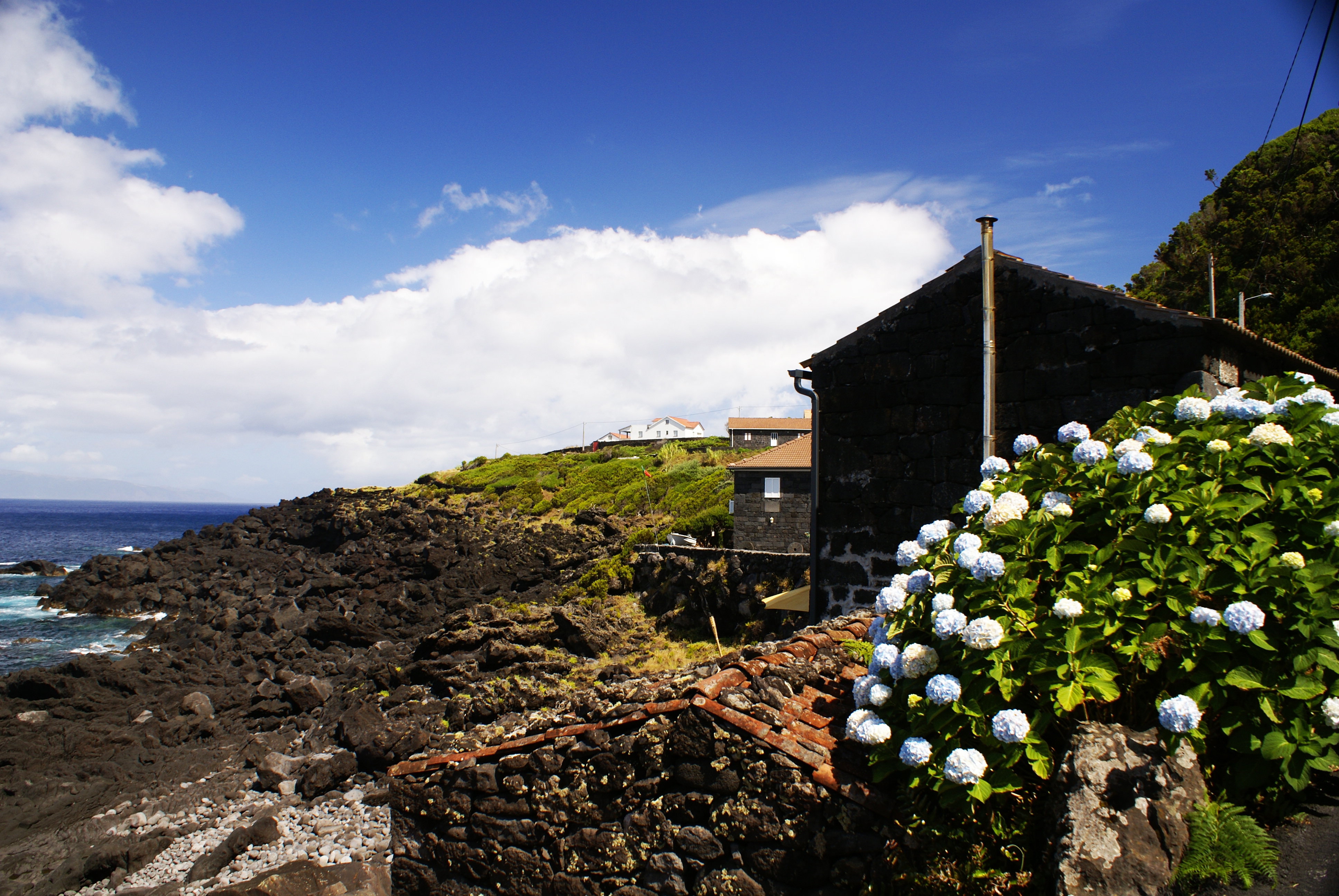 Fajã da Baíxa, paisagem, Lajes do Pico, ilha do Pico, Açores, Portugal